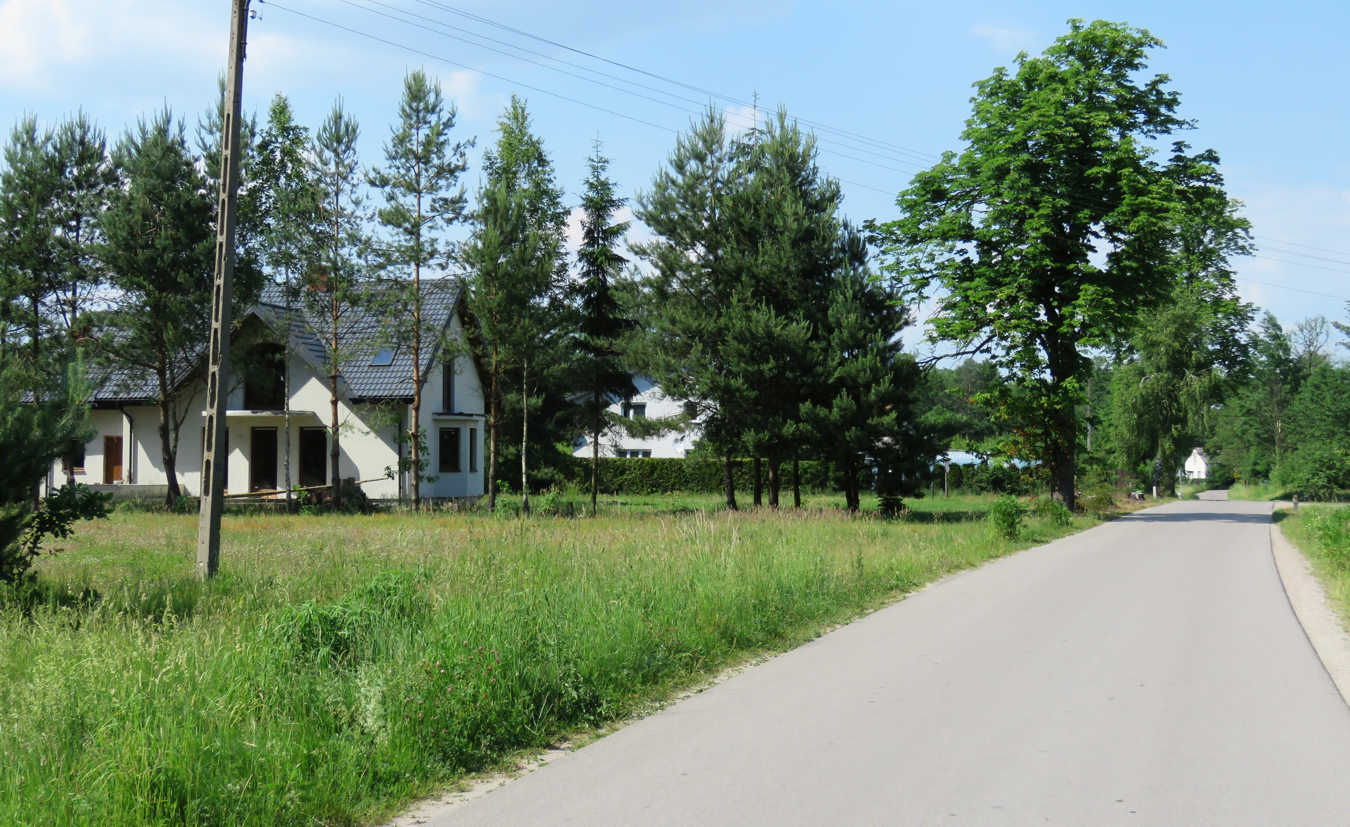 Rumianka, gm.Żabia Wola